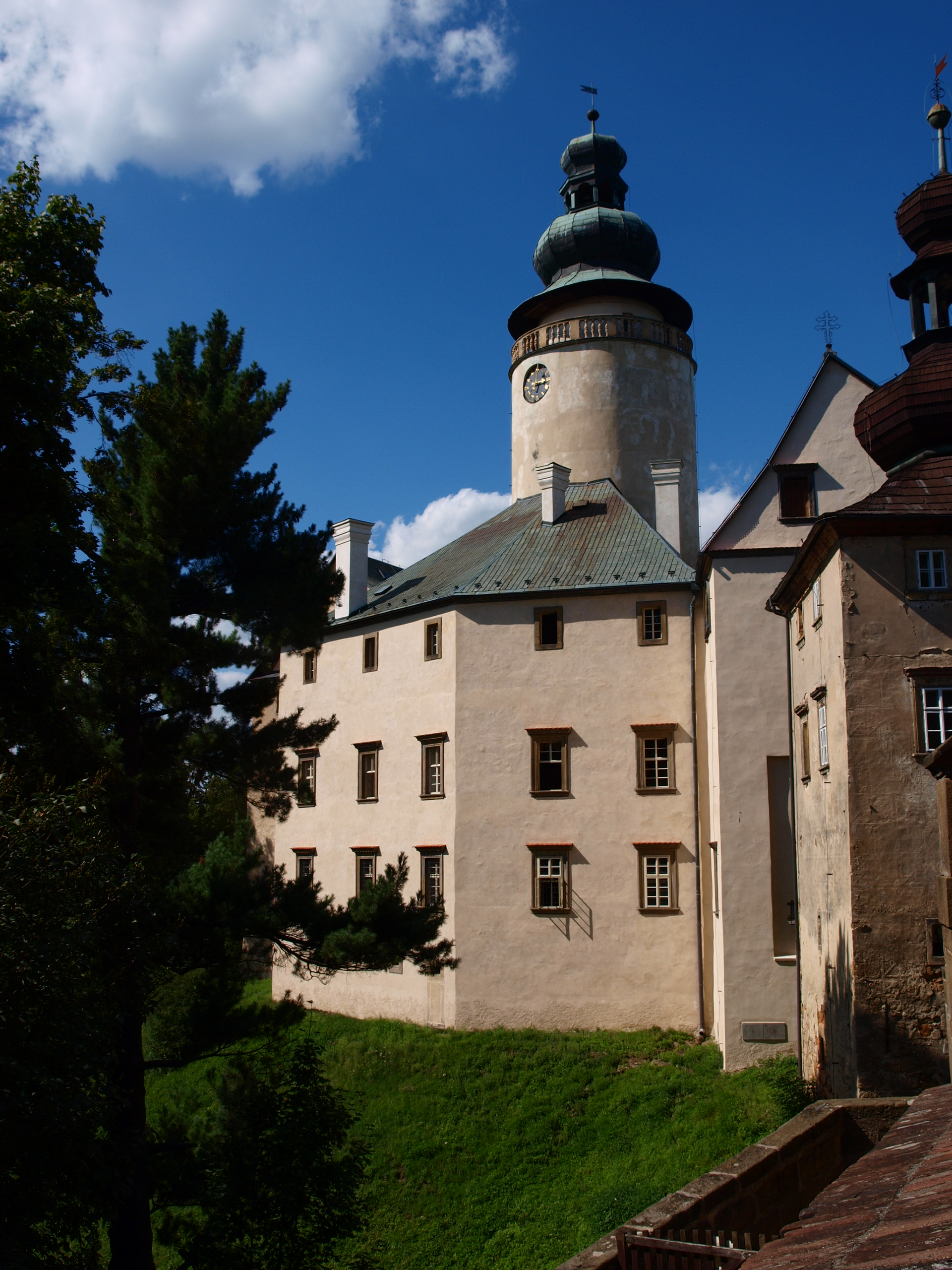 Zámek Lemberk